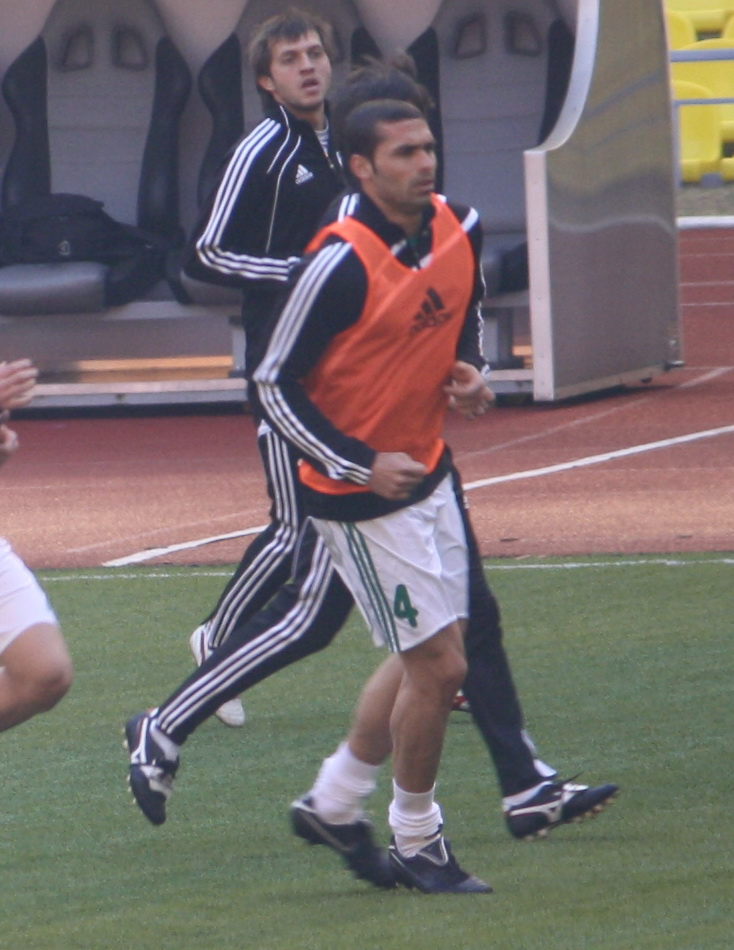 Ze'ev Haimovich